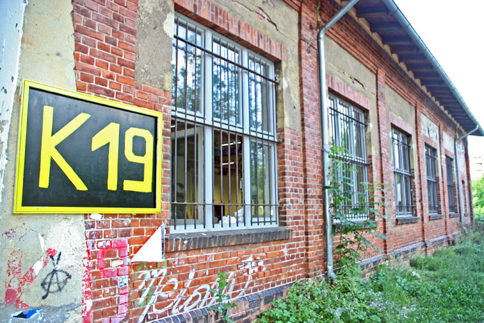 Studentischer Kulturclub in der ehemaligen Henschel-Halle K19